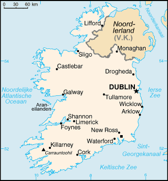 Nederlandse vertaling CIA-kaart